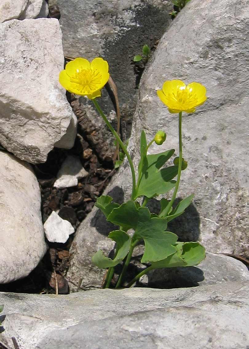 Ranunculus hybridus', Sengsengebirge, Upper Austria, Austria